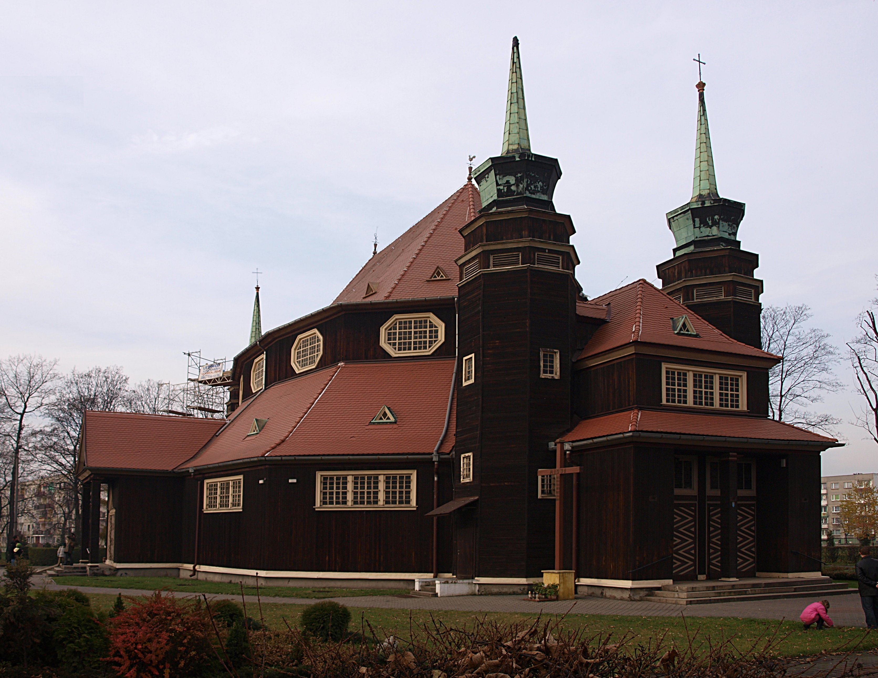 Zabrzański kościół pw. św. Jadwigi Śląskiej.